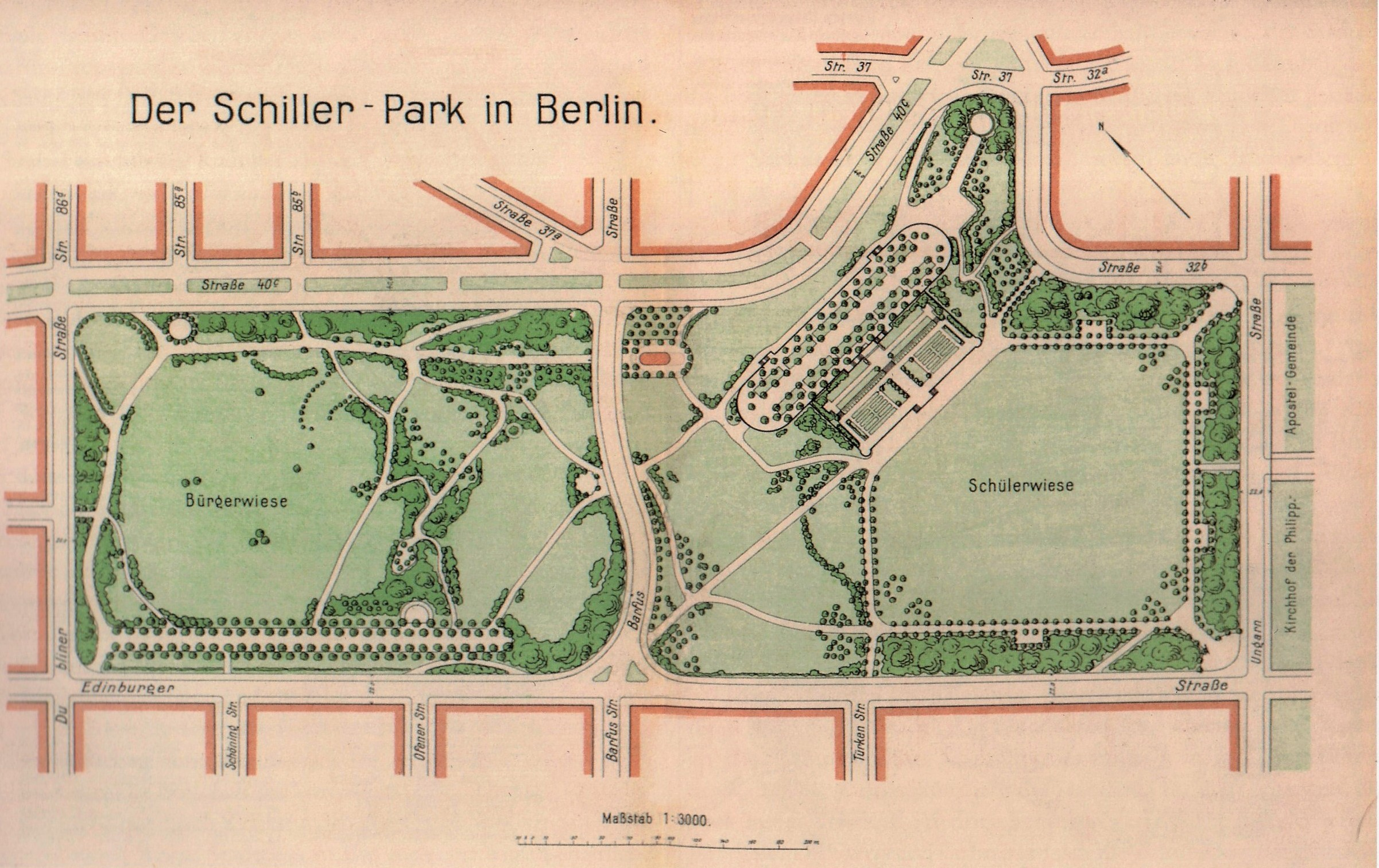 Lageplan des Schillerparks in Berlin, präsentiert auf der Städtebau-Ausstellung 1910. Quelle: Bericht über die Gemeinde-Verwaltung der Stadt Berlin in den Verwaltungs-Jahren 1906 bis 1910. Erster Band, Berlin 1912, nach S. 222